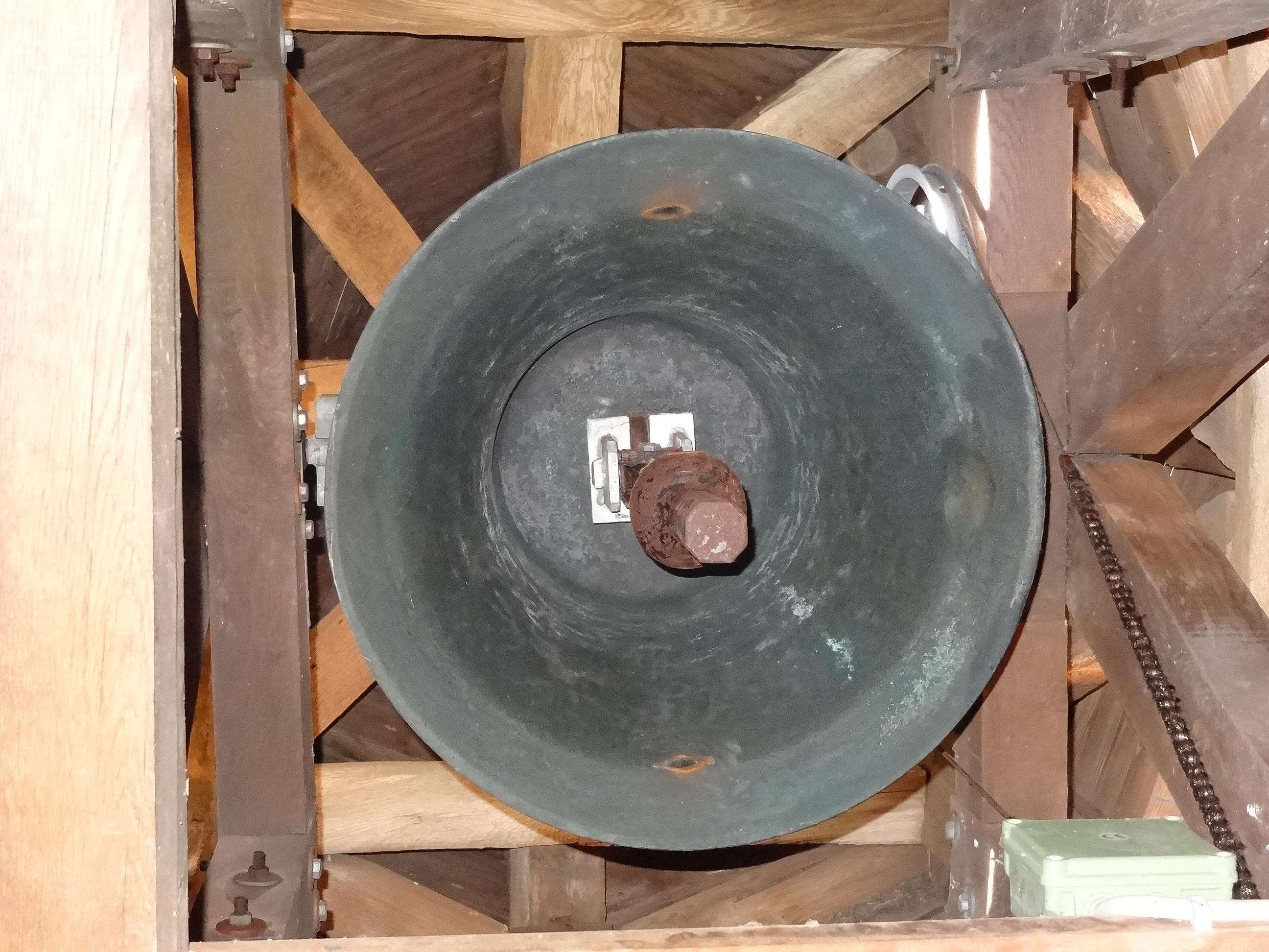 Evangelische Kirche Klein-Eichen